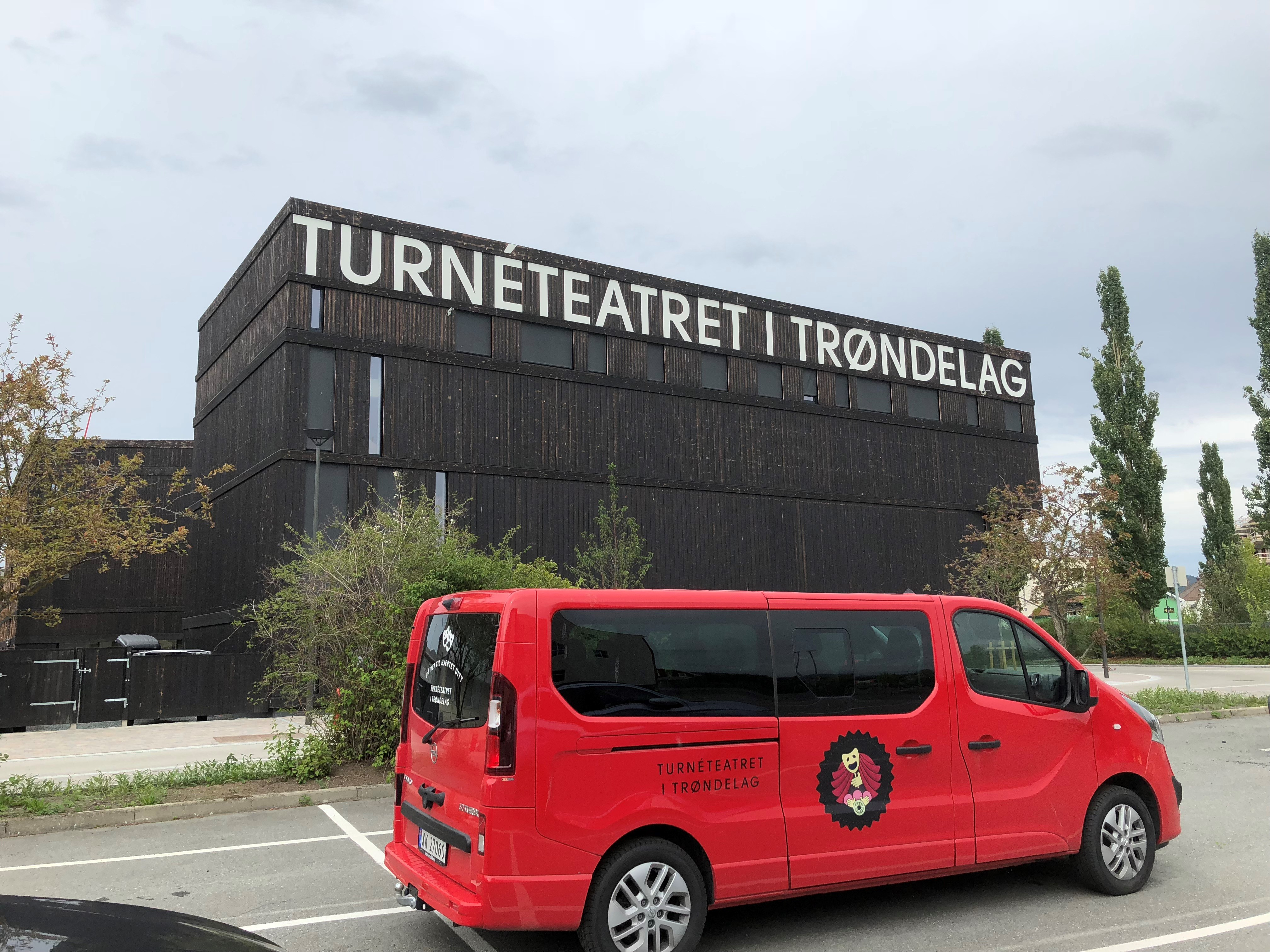 Sørveggen på teaterbygget til Turnéteatret i Trøndelag], åpnet i 2017